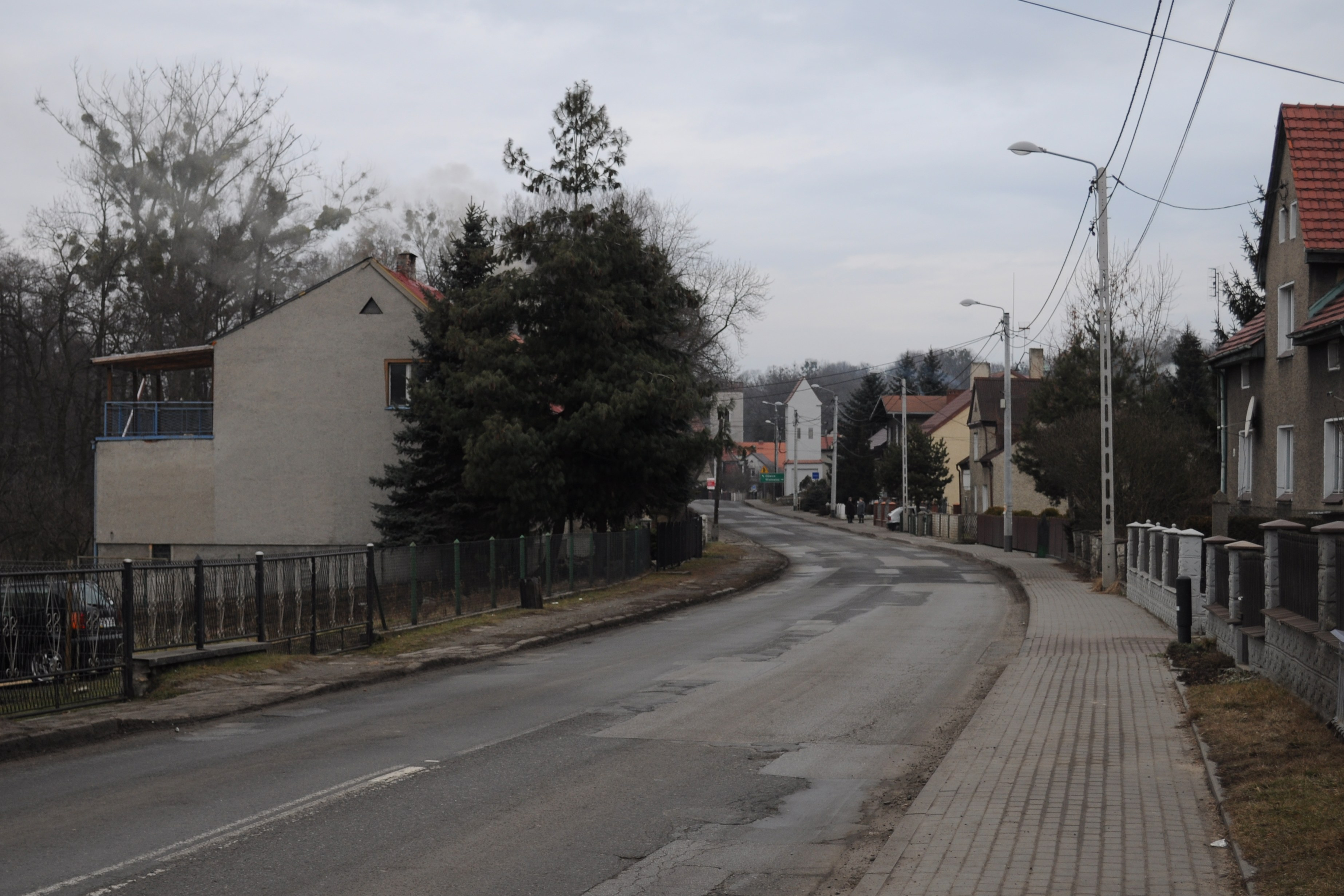 Kamieniec. Ulica Tarnogórska.